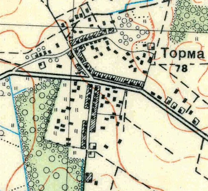 Топографическая карта Ленинградской области, квадрат О-35-22-Г-г (Торма), деревня Торма.